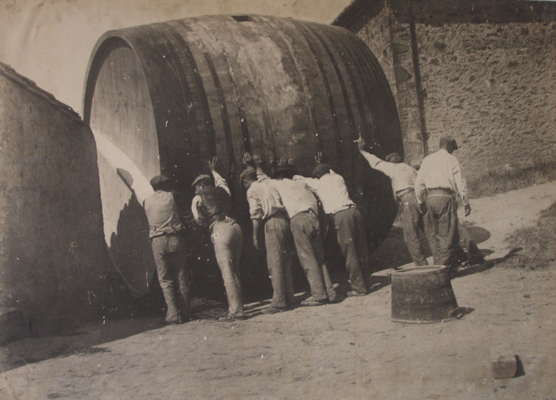 Foudre en bois du département de l'Aude. Photo prise à l'exposition de l'abbaye de Caunes-Minervois